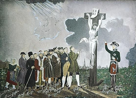 Allegorie auf das Toleranzpatent Kaiser Josephs II. vom 13. Oktober 1781. Aquarell, 1785 (Wien Museum).